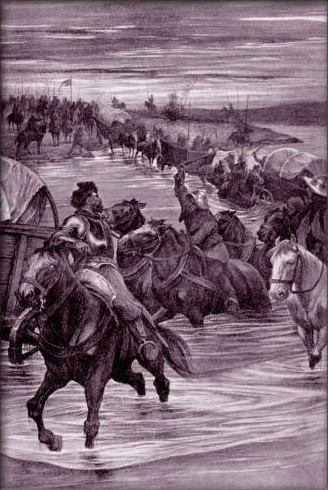 Věnceslav Černý - Odchod vojů Žižkových z Kostelce nad Labem